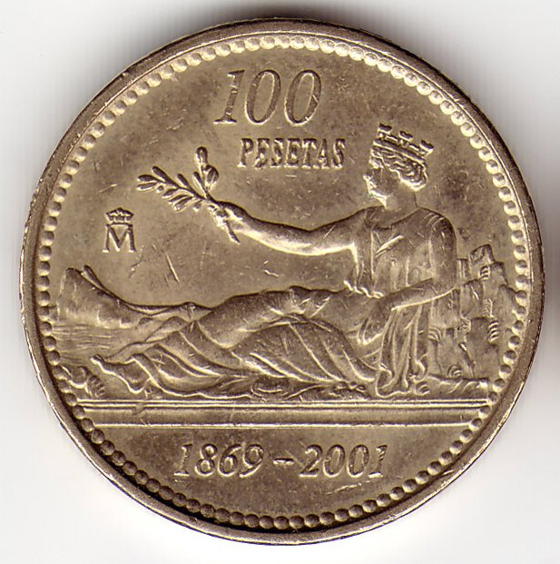 100 peseta reverse hispania